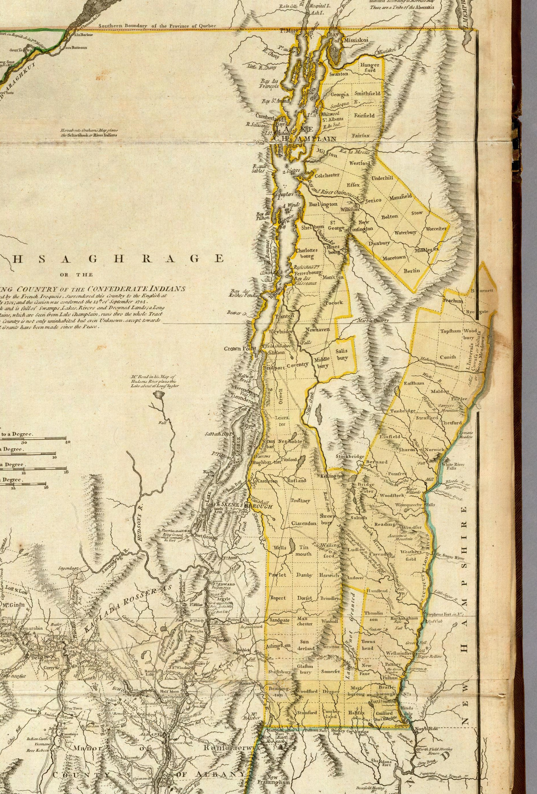 En jaune, le futur Vermont.